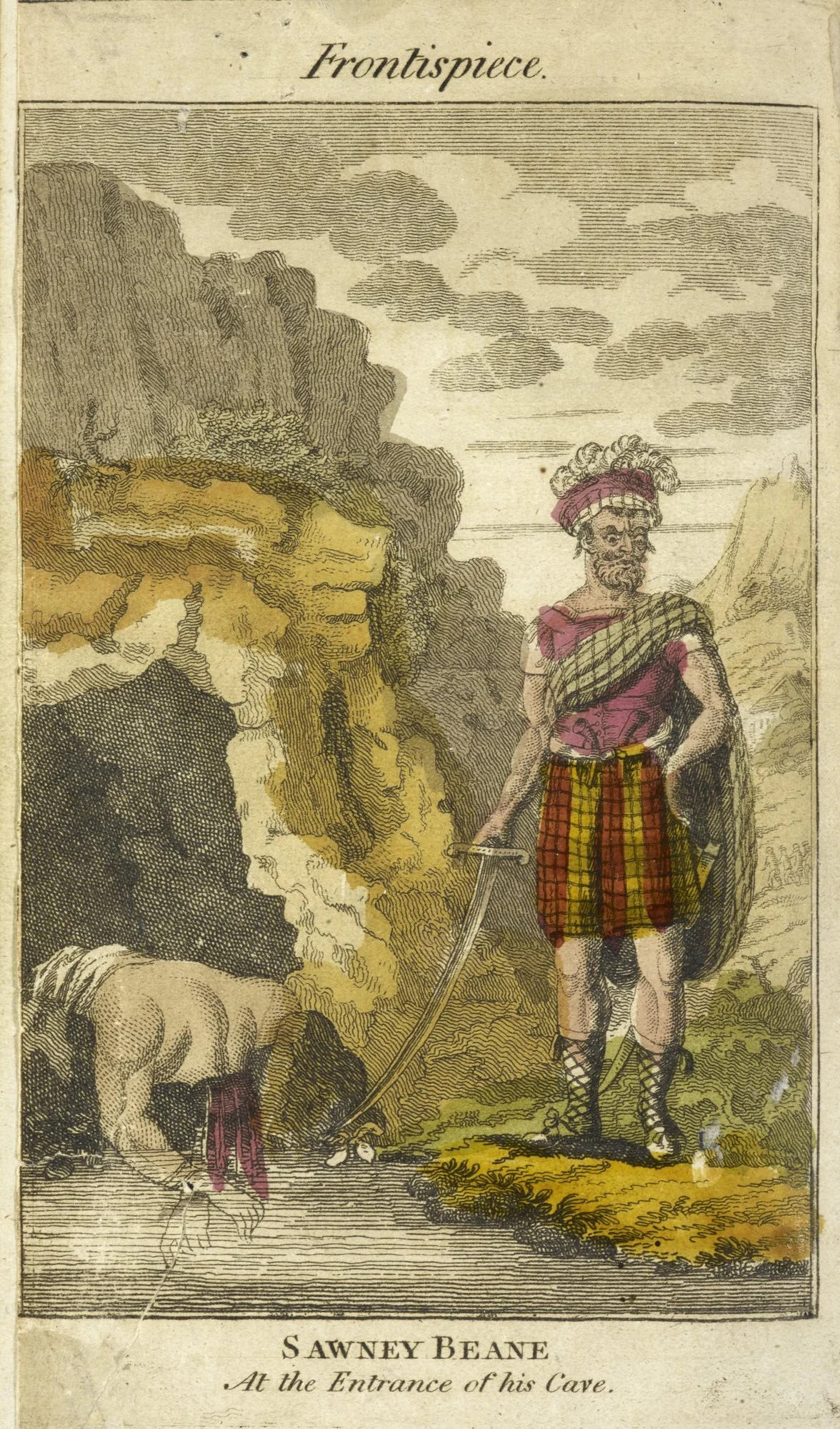 Représentation de Sawney Bean en costume traditionnel écossais.